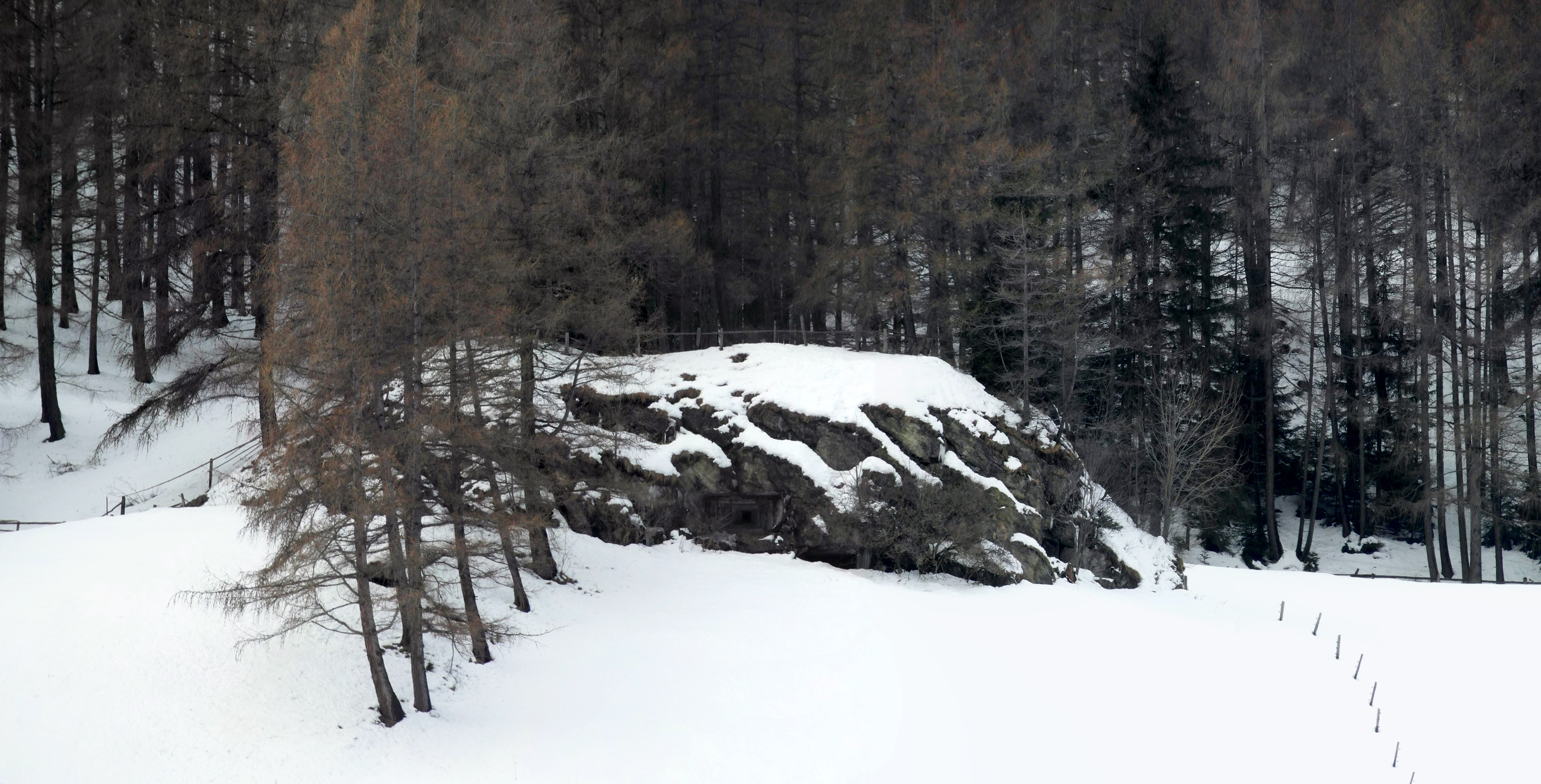 Opera 15 Tenne